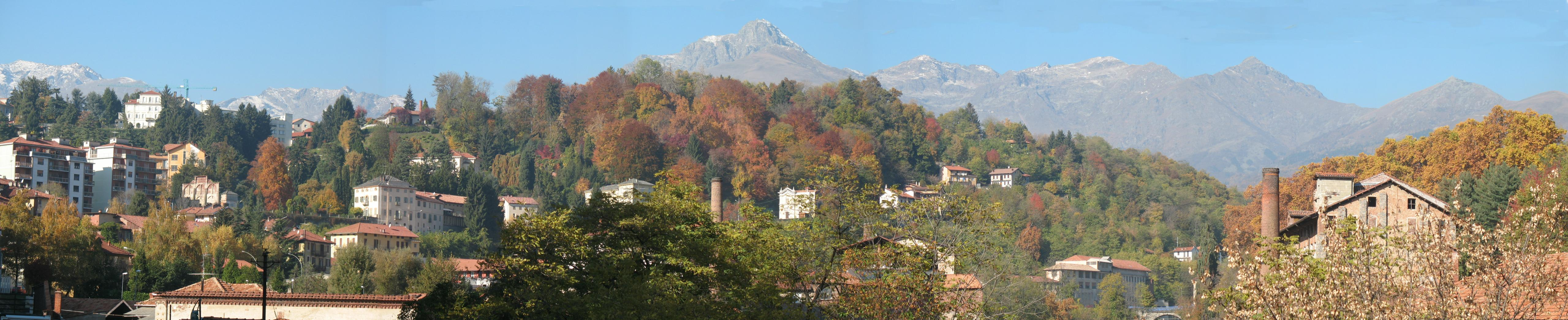 Biella - panorama da Chiavazza verso le Alpi Biellesi